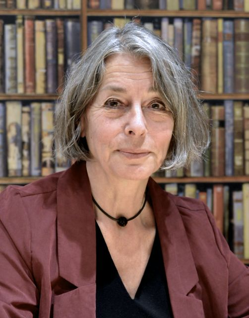 Författaren Åsa Moberg på Akademibokhandeln, Mäster Samulesgatan i Stockholm den 6 september 2014.